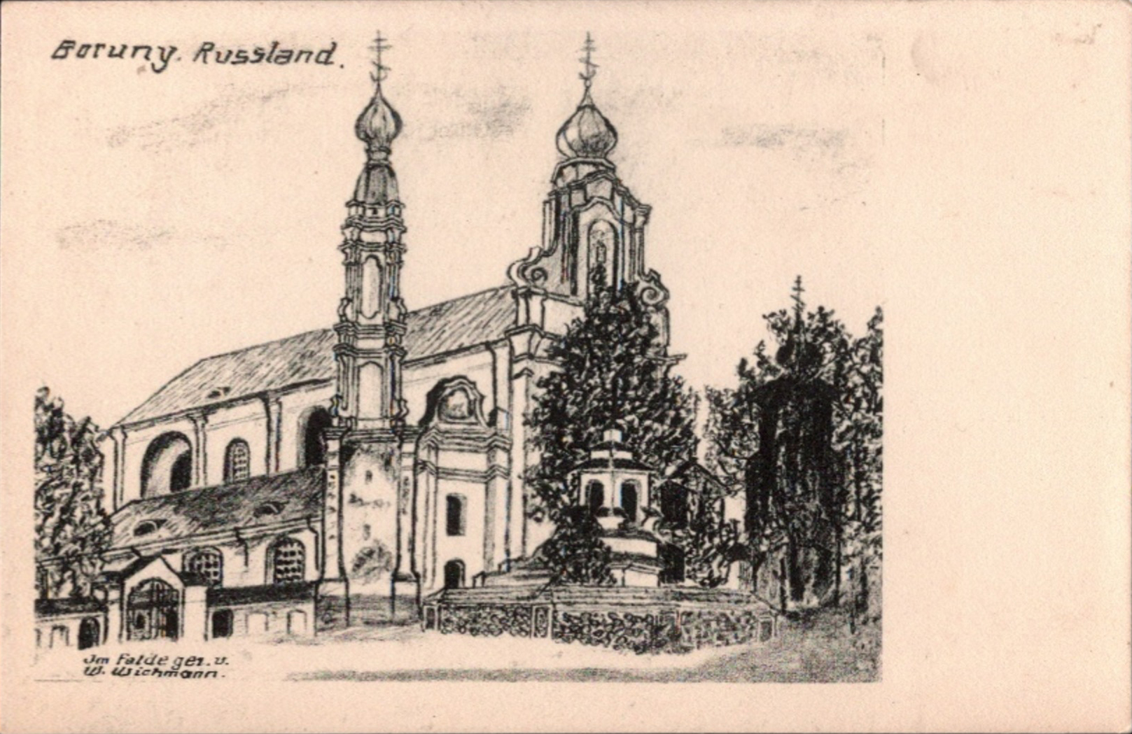 Беларуская (тарашкевіца): Баруны (Baruny), пляц Рынак (plac Rynak). Царква Сьвятых Апосталаў Пятра і Паўла і манастыр базылянаў